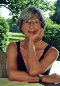 Prof. Marga Schiml - Gesangslehrerin für professionelle Sänger